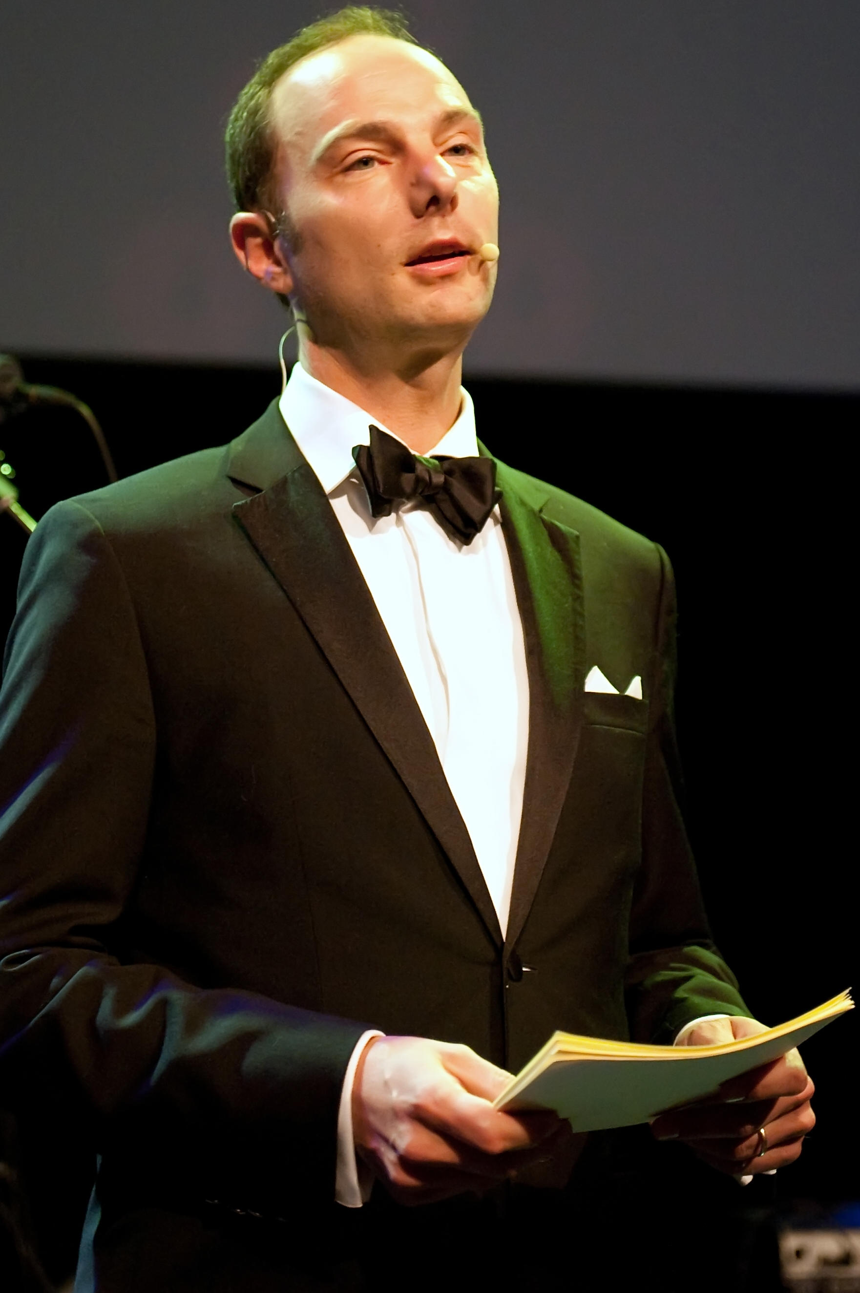 Het feest in Amsterdam was vooral niet politiek beladen. Halsema hield geen campagnepraatje voor GroenLinks, maar prees vooral de vrijheid van meningsuiting in het algemeen. De bijeenkomst bestond verder uit veel dans en optredens van onder andere Ellen ten Damme en Sara Kroos. Femke's #twist